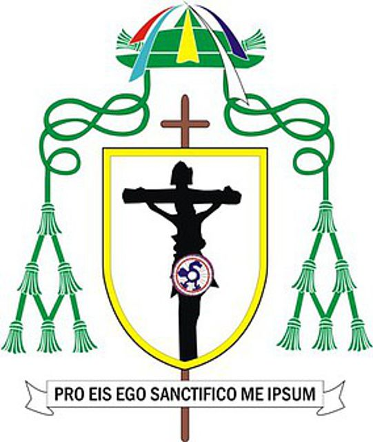 Escudo de armas del Monseñor José Luis Mendoza Corzo, obispo auxiliar de Tuxtla Gutiérrez.